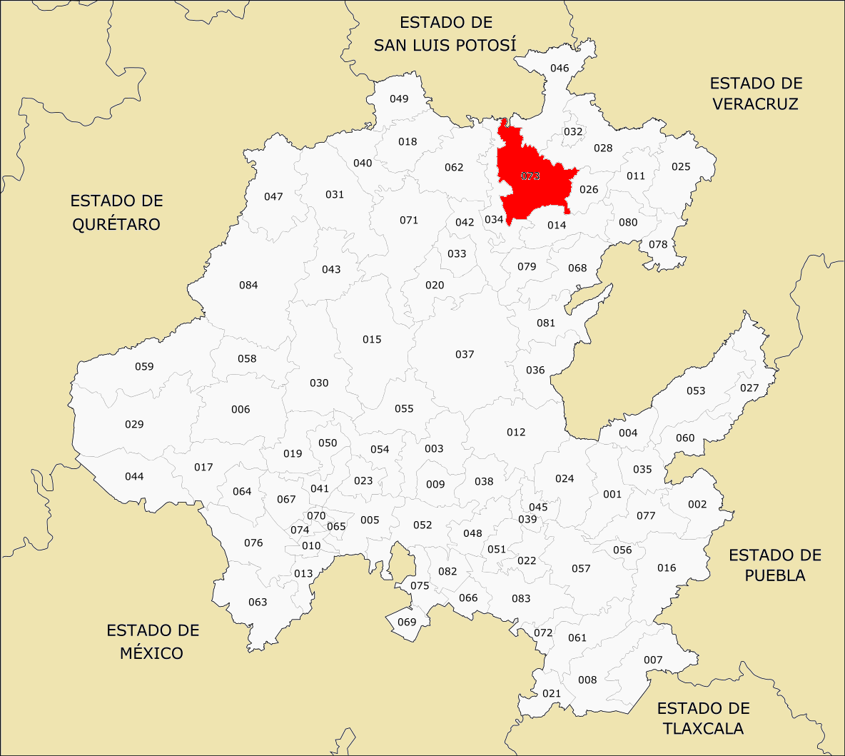 Municipios de Hidalgo